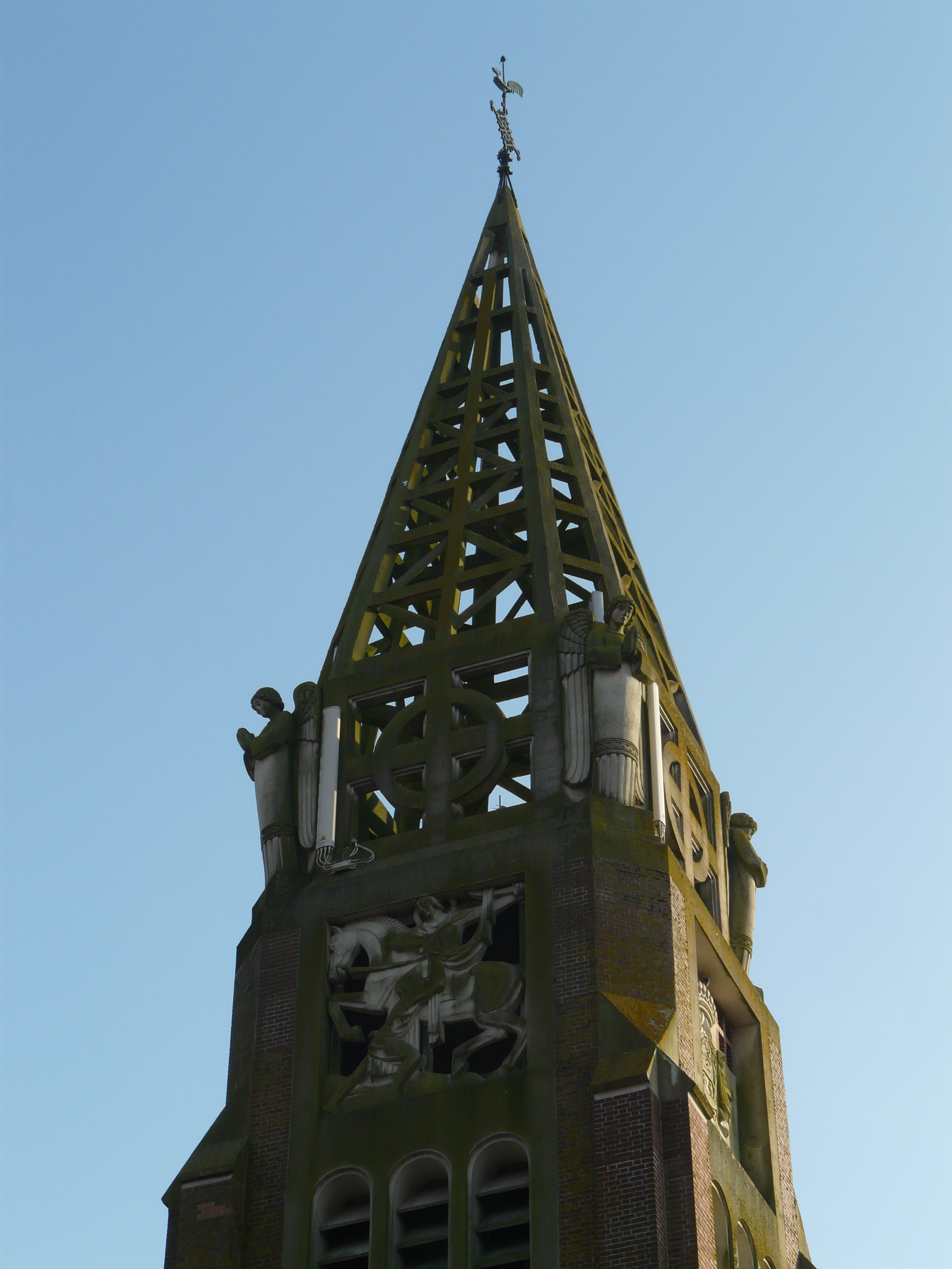 La flèche du clocher de l'église Saint-Martin de Fontaine-Notre-Dame (Nord)